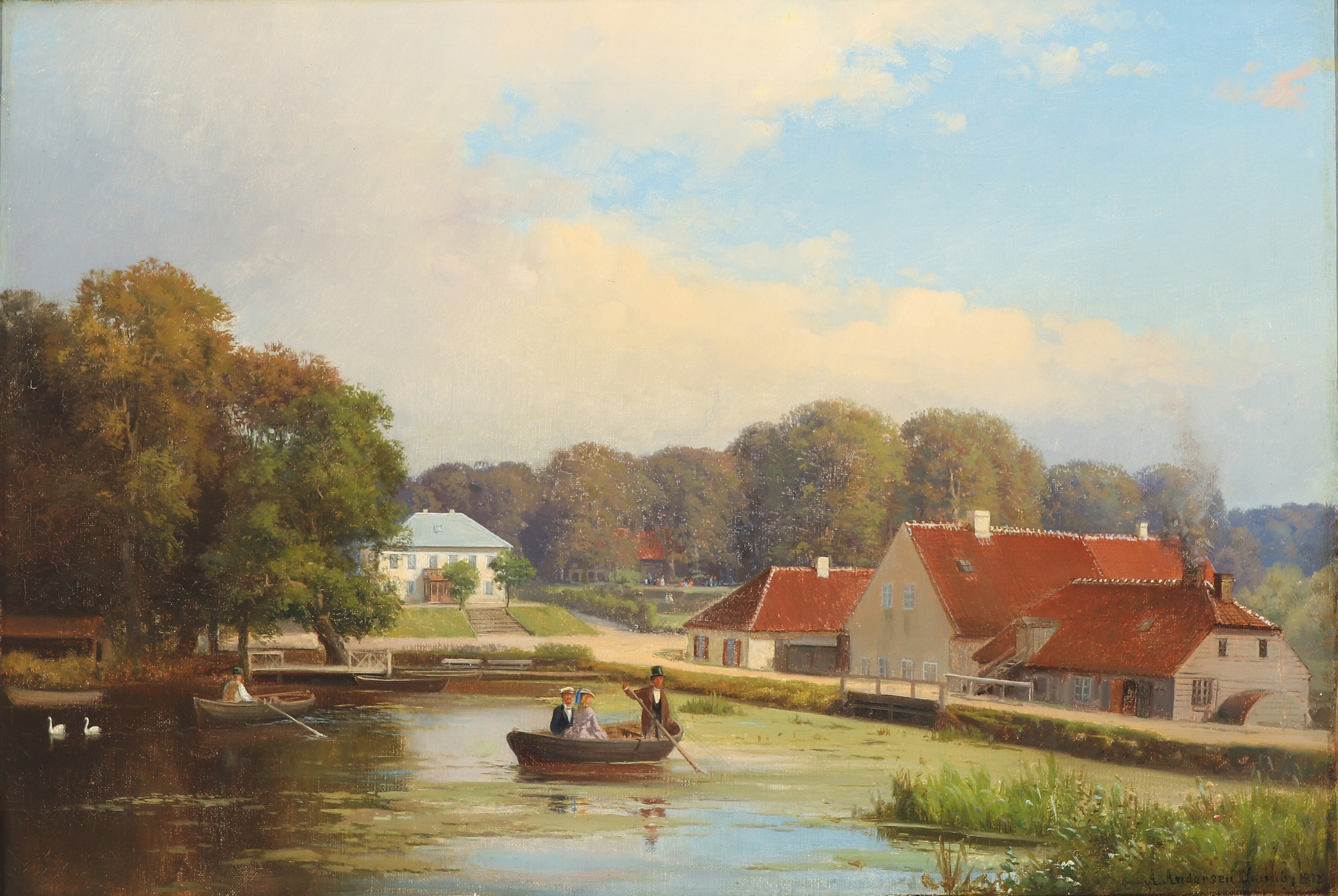 Raadvad eller Rådvad er en lille bebyggelse i Taarbæk Sogn og Lyngby-Taarbæk Kommune ved Mølleåen i midten af Dyrehaven. Den er opstået som en tidlig industriby omkring vandmøllen.